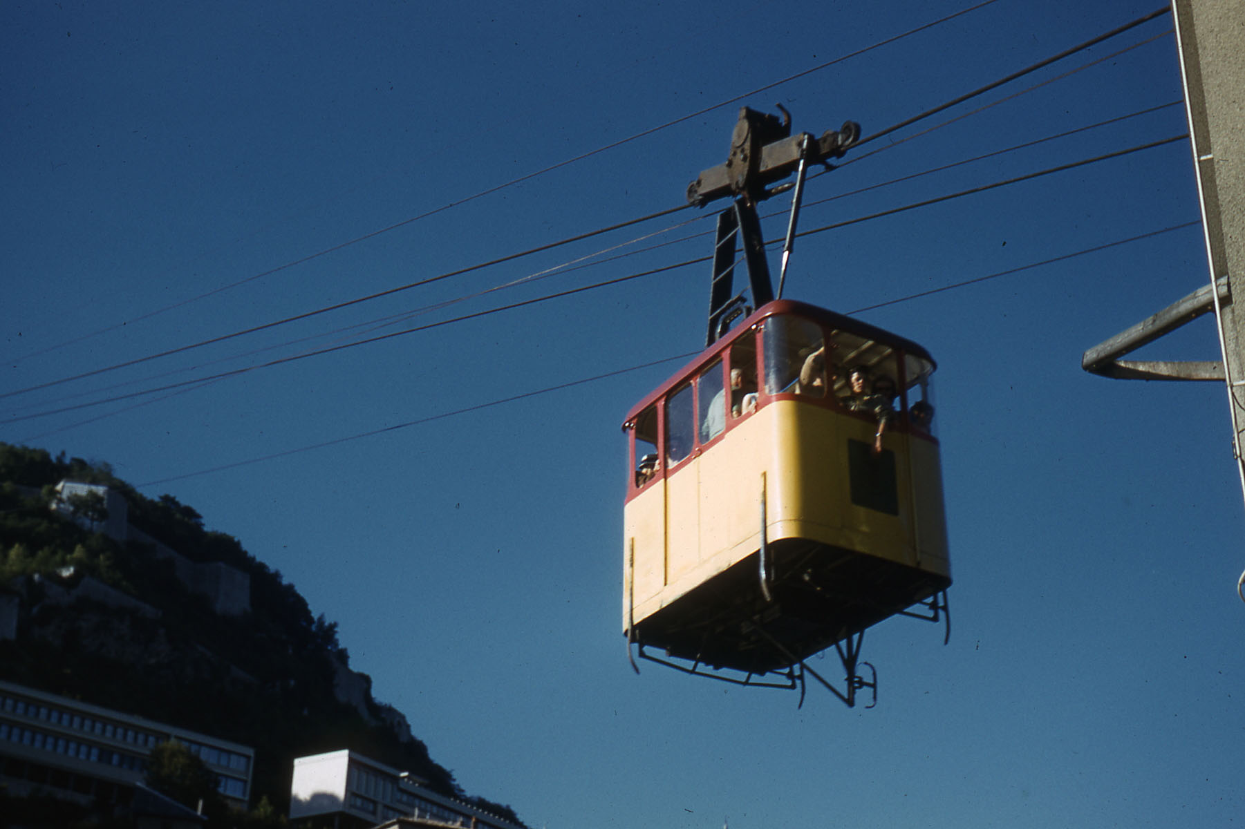 Téléphérique de la Bastille à Grenoble en 1962.